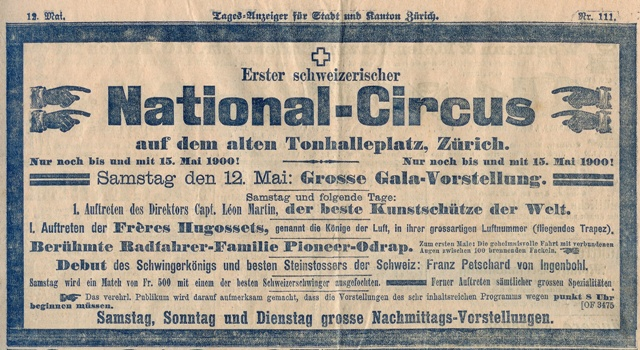 Zeitungsinserat vom Schweizer Nationalzirkus anno 12. Mai 1900 mit Betschart Franz aus Ingenbohl.